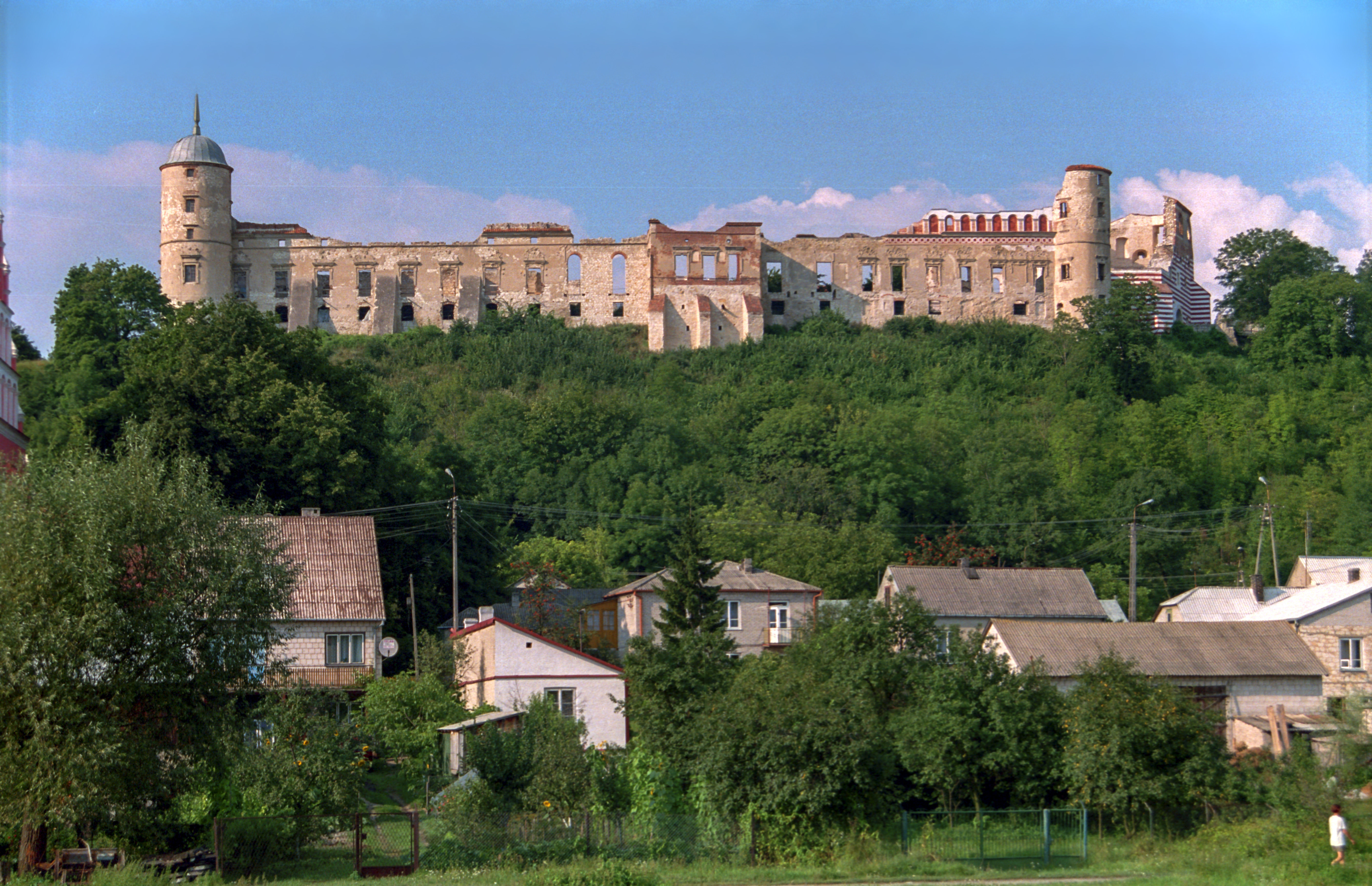 Janowiec